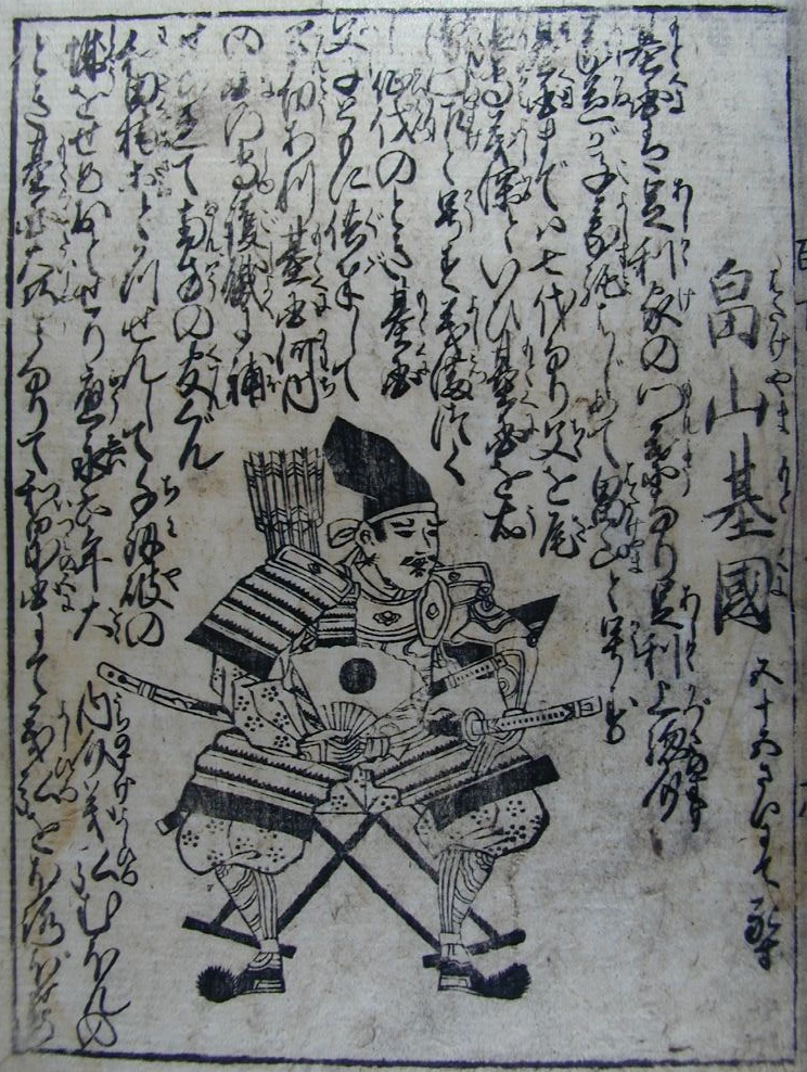 hatakeyama_motokuni